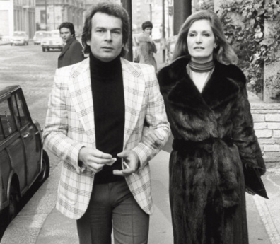 Dalida à Milan avec Richard Saint-Germain en 1975